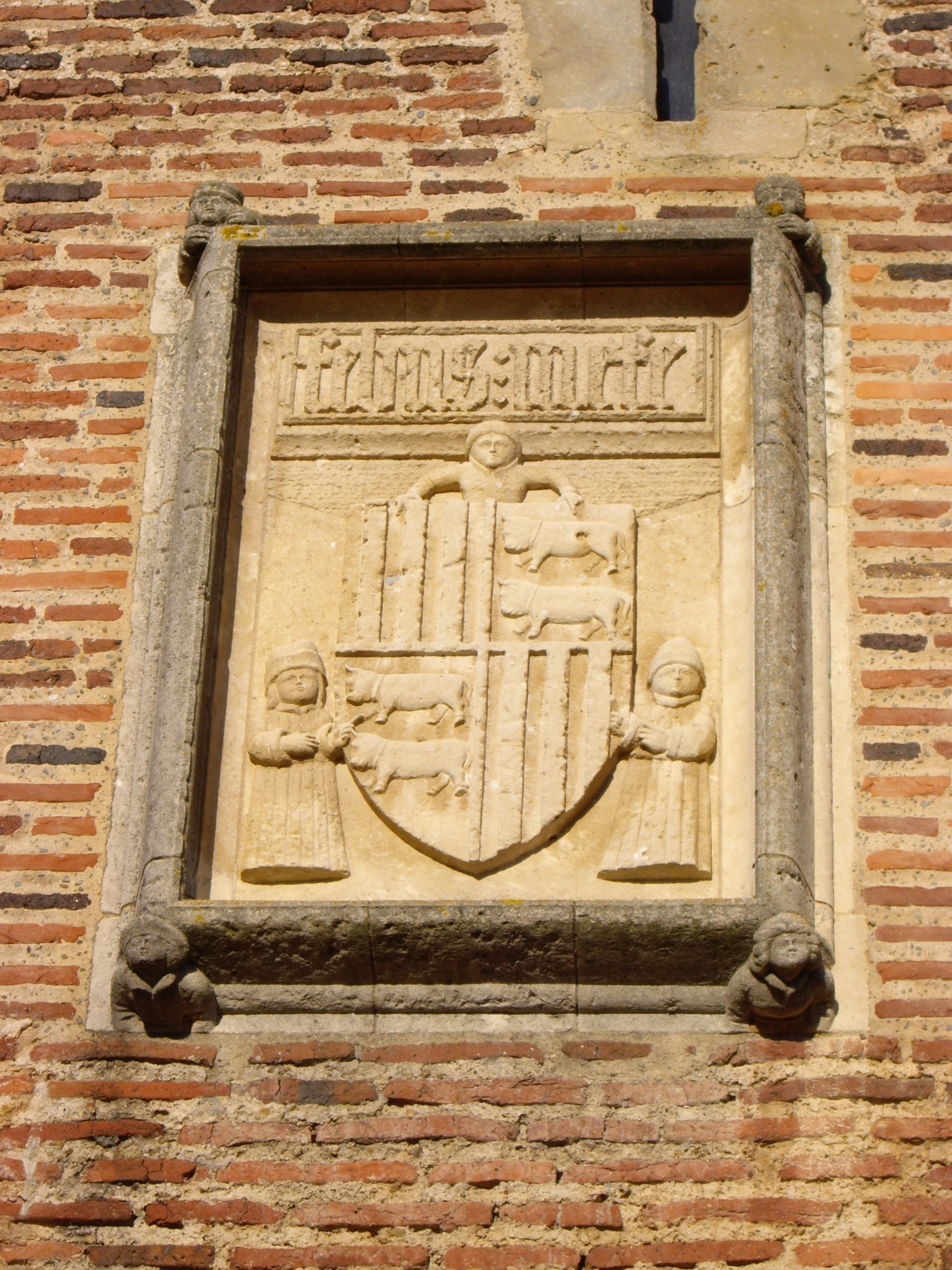 Château de Montaner (64)